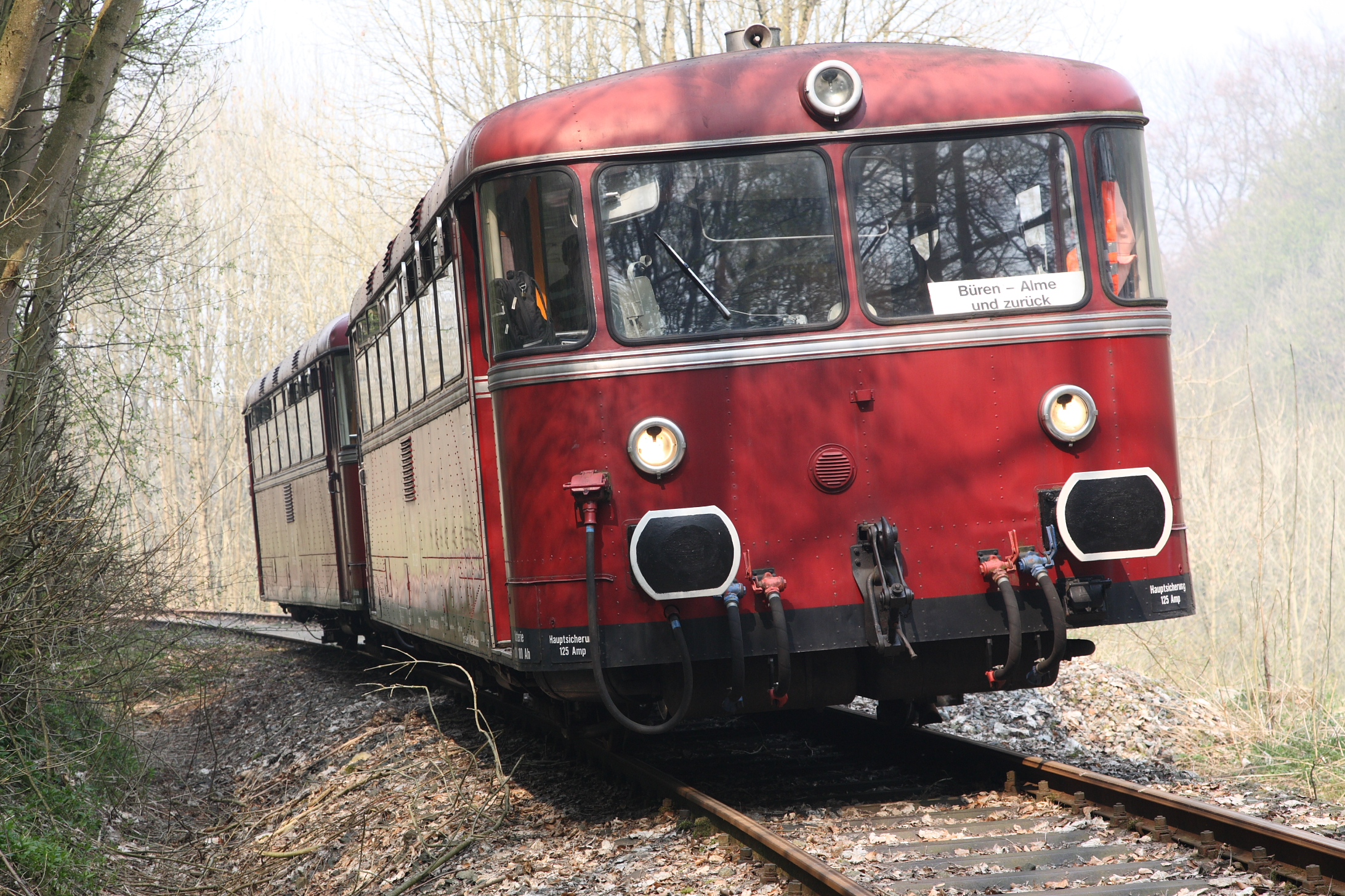 Uerdinger Schienenbus Waldbahn Almetal VT98